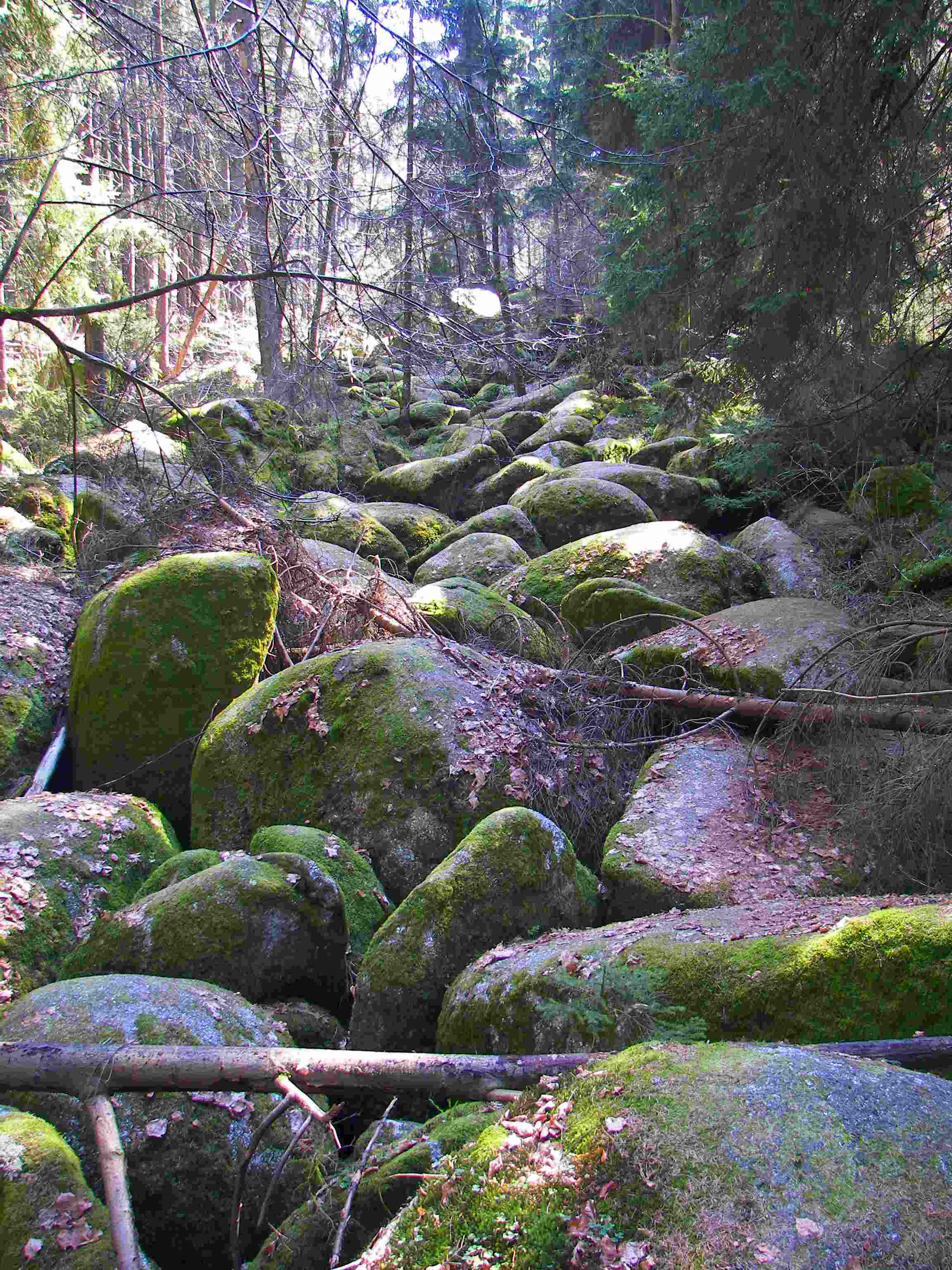 Das Naturschutzgebiet Doos liegt etwa 6 km nordöstlich von Weiden bei Diepoldsreuth im Gemeindegebiet Floß